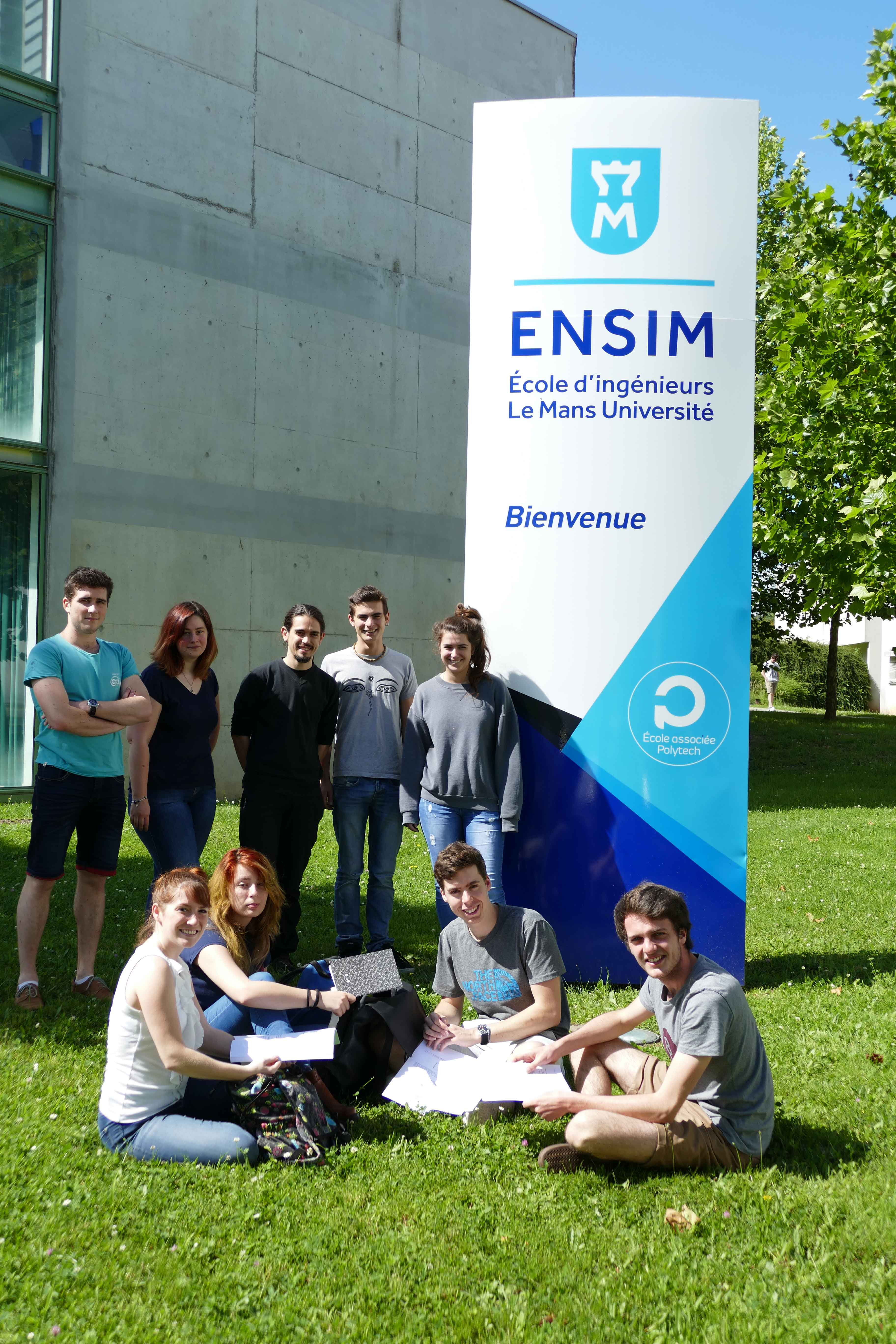 Nouveau logo 2017